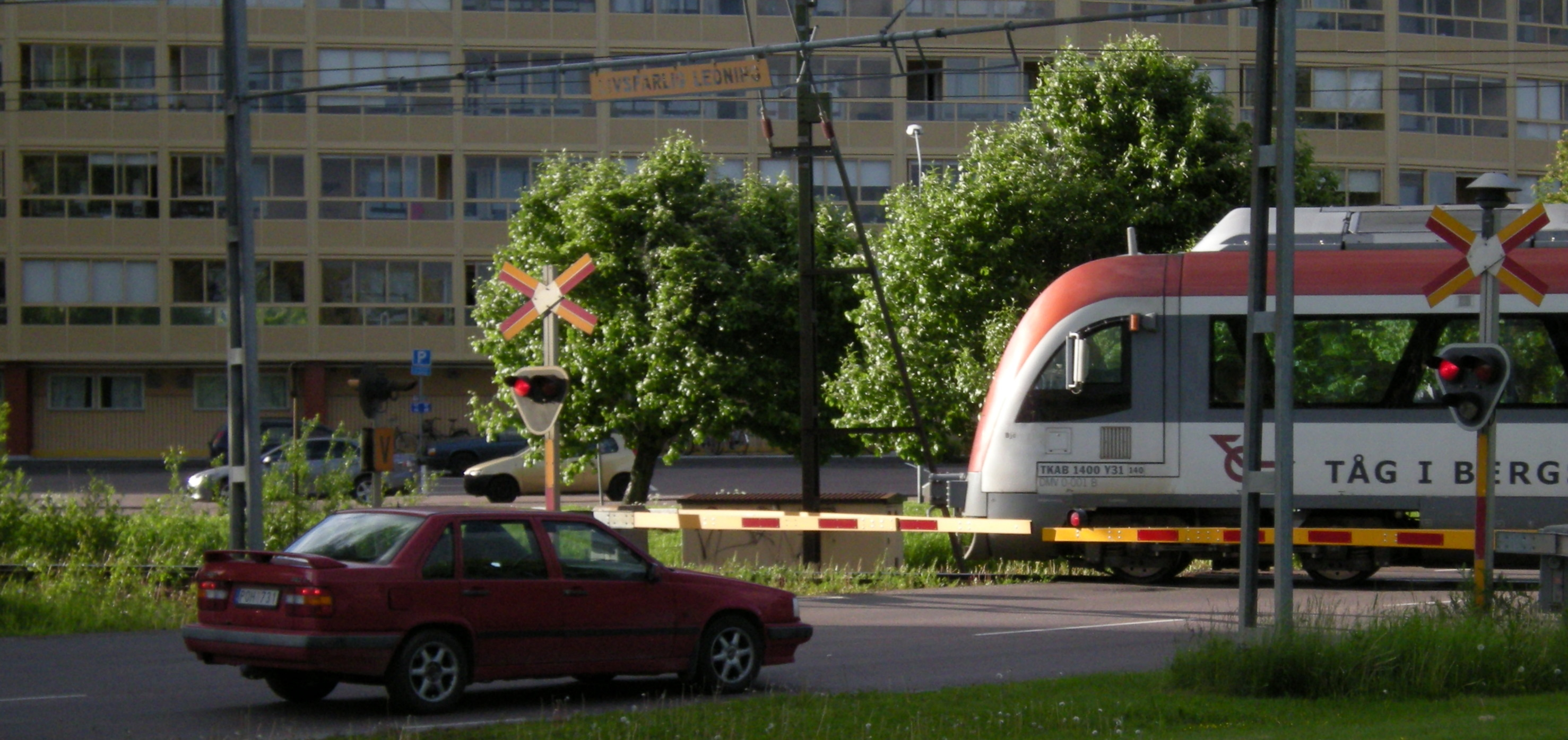 Plankorsning. Ringen, Borlänge